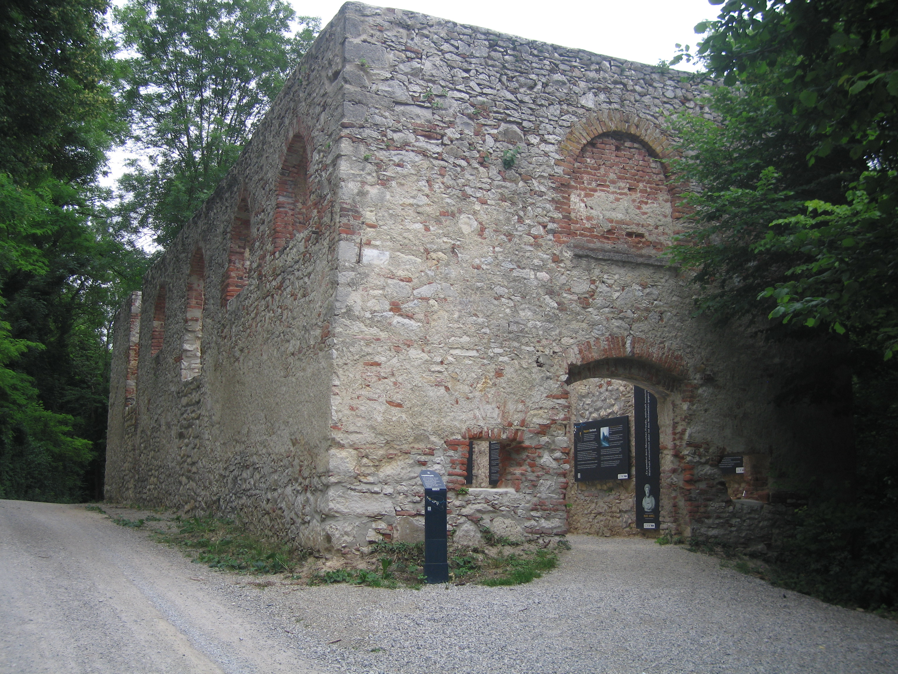 Bestandteil der "äußeren Pforte" des Klosters St. Anna in der Wüste. Die Kapelle war sowohl vom Kloster als auch von außen zugänglich.